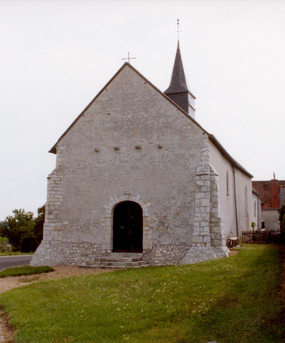 Église Saint Pierre de Lancôme (Loir et Cher). Auteur : Thonic